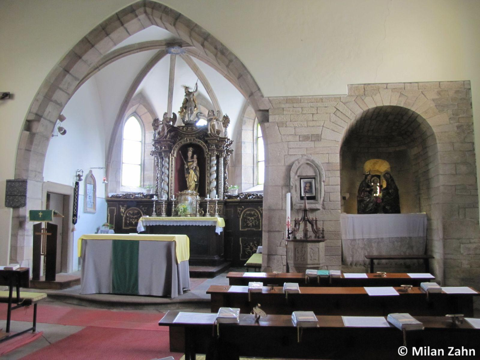 Interiér kostela svatého Jiří v Plzni